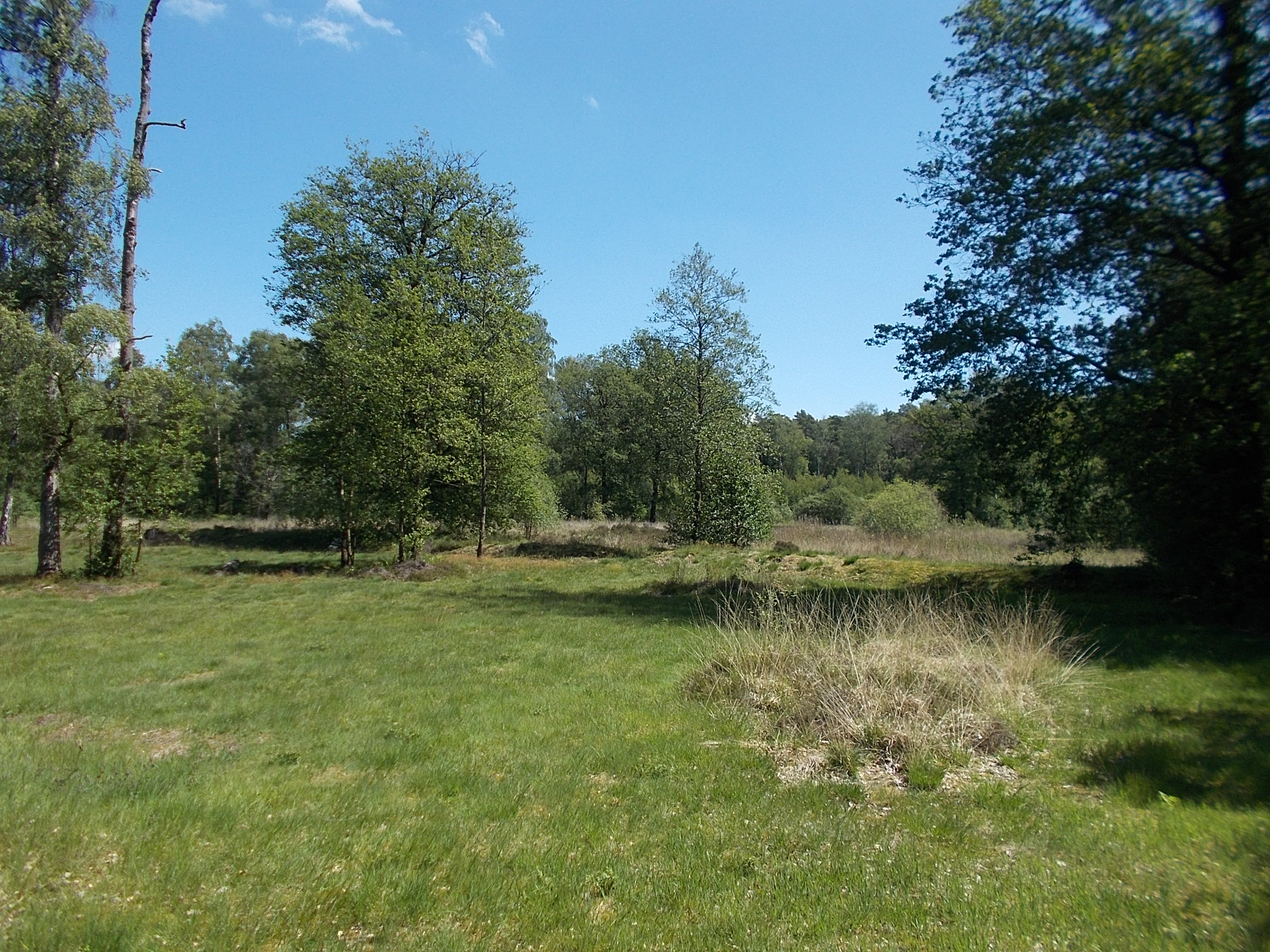 gras en berken